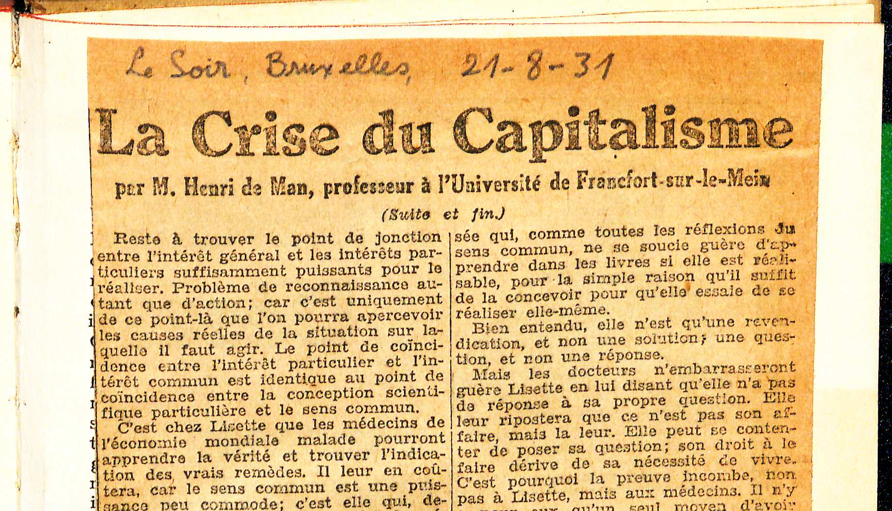 Henri De Man La Crise du Capitalism, in: Le Soir 31. August 1931